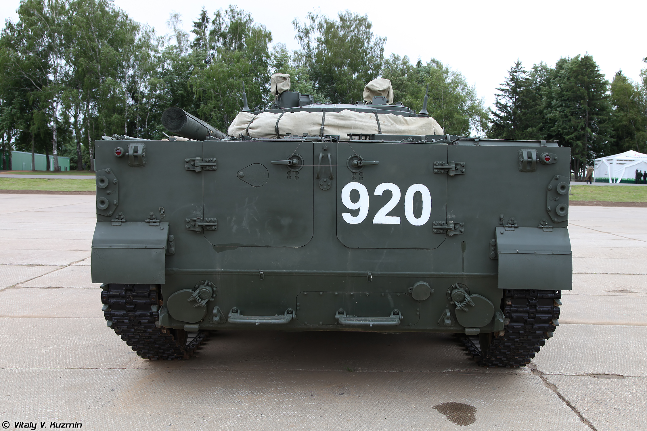 БМП-3